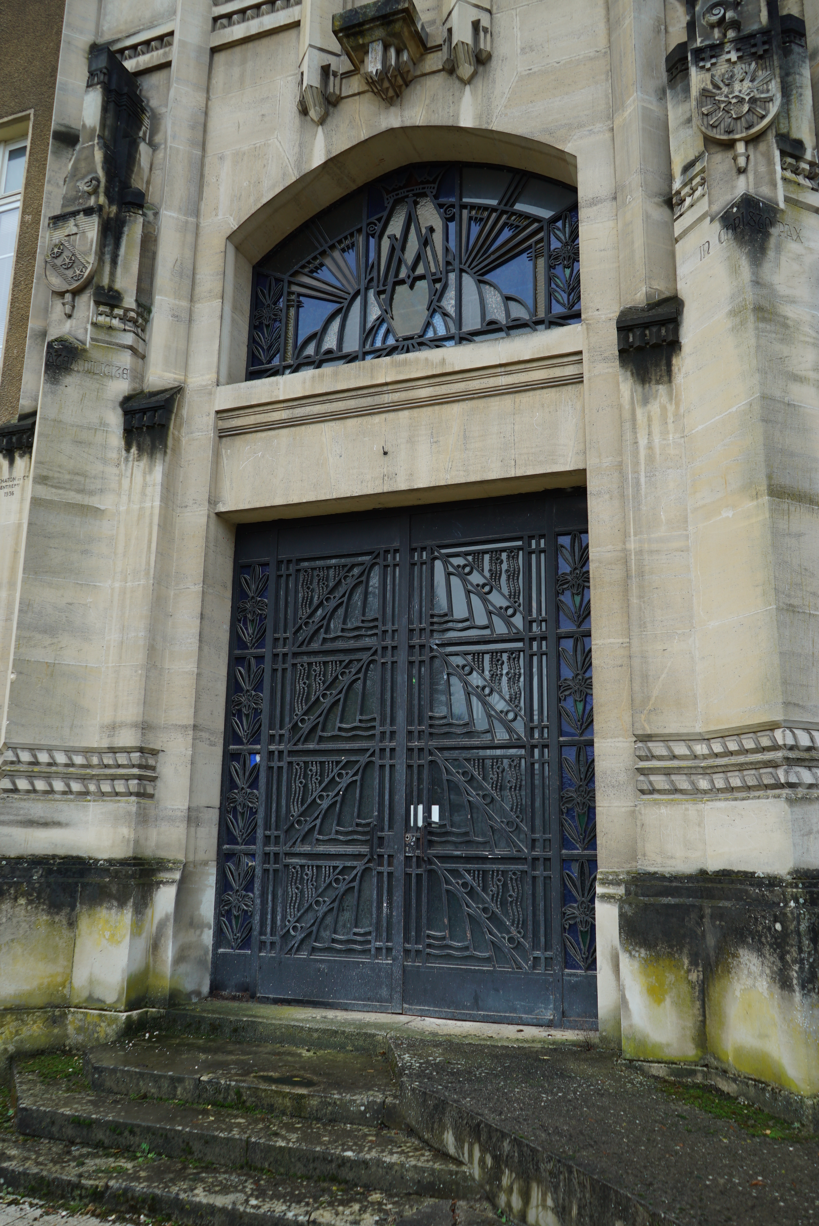 porte de l'EHPAD.